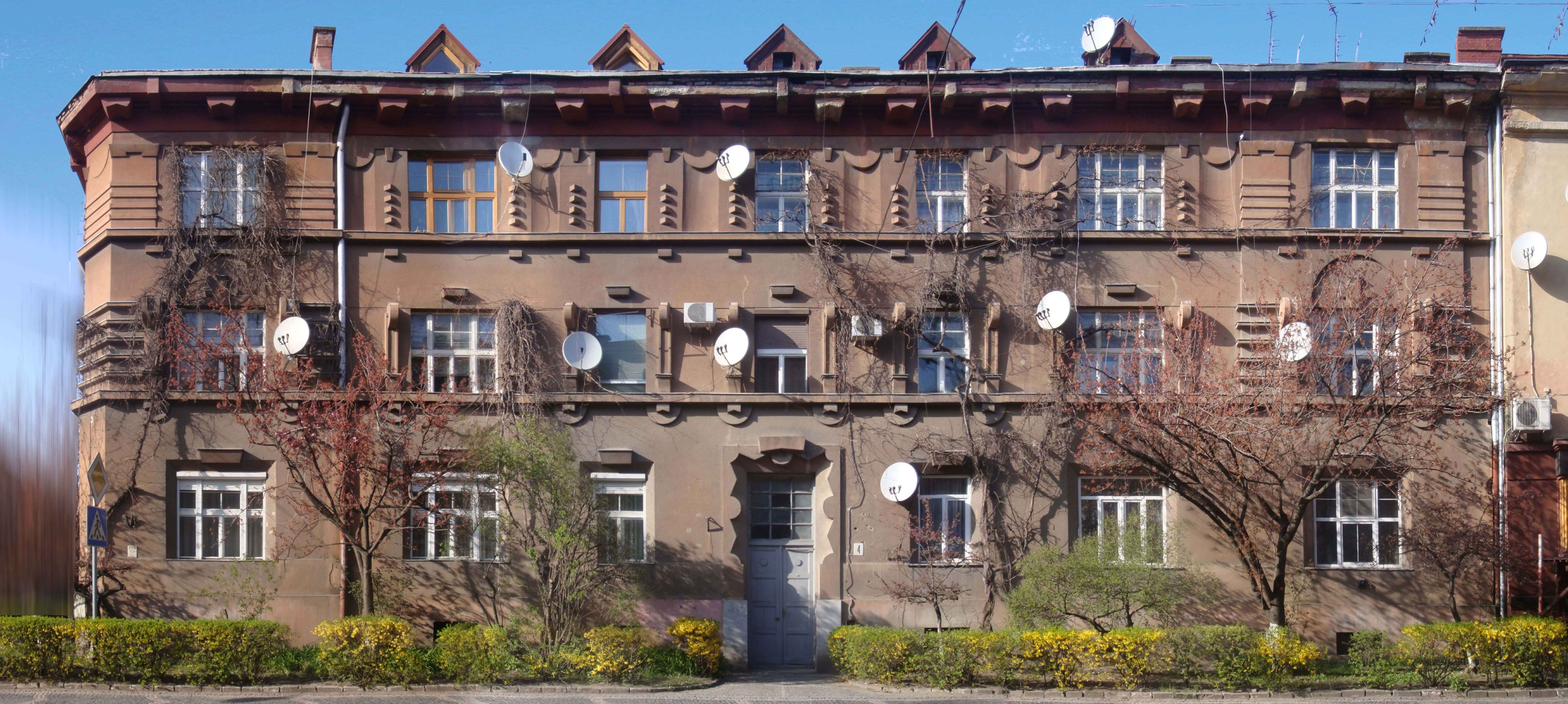 V Užhorode byl v letech 1923 - 1924 na ulici Dovženka postavený objekt, který nejprve sloužil jako provizorní vládní budova pro vykonávání činností státních zaměstnanců. Po dokončení výstavby zemského úřadu v Užhorodě, se státní správa z tohoto objektu odstěhovala a budova se začala využívat pro obytnou funkci. Autorem projektu je architekt Dryák. Jako obytný dům slouží až do současnosti. Objekt je trojpodlažní, se sedlovou střechou a půdorysem tvaru “L”, s výraznými tvaroslovnými prvky na fasádě v tendencích kubizmu a rondokubizmu. Na objekte se objevuje výrazná barevnost v podobě červeného pásu zvýrazňujícího podokenní římsu a vikýře. Barevnost fasády není použitá na 102 vyzdvihnutí tvaroslovných prvků - ty jsou ponechány v převažující barevnosti fasády - v okrové barvě, která je dnes poznačená vlivem času a znečistění.